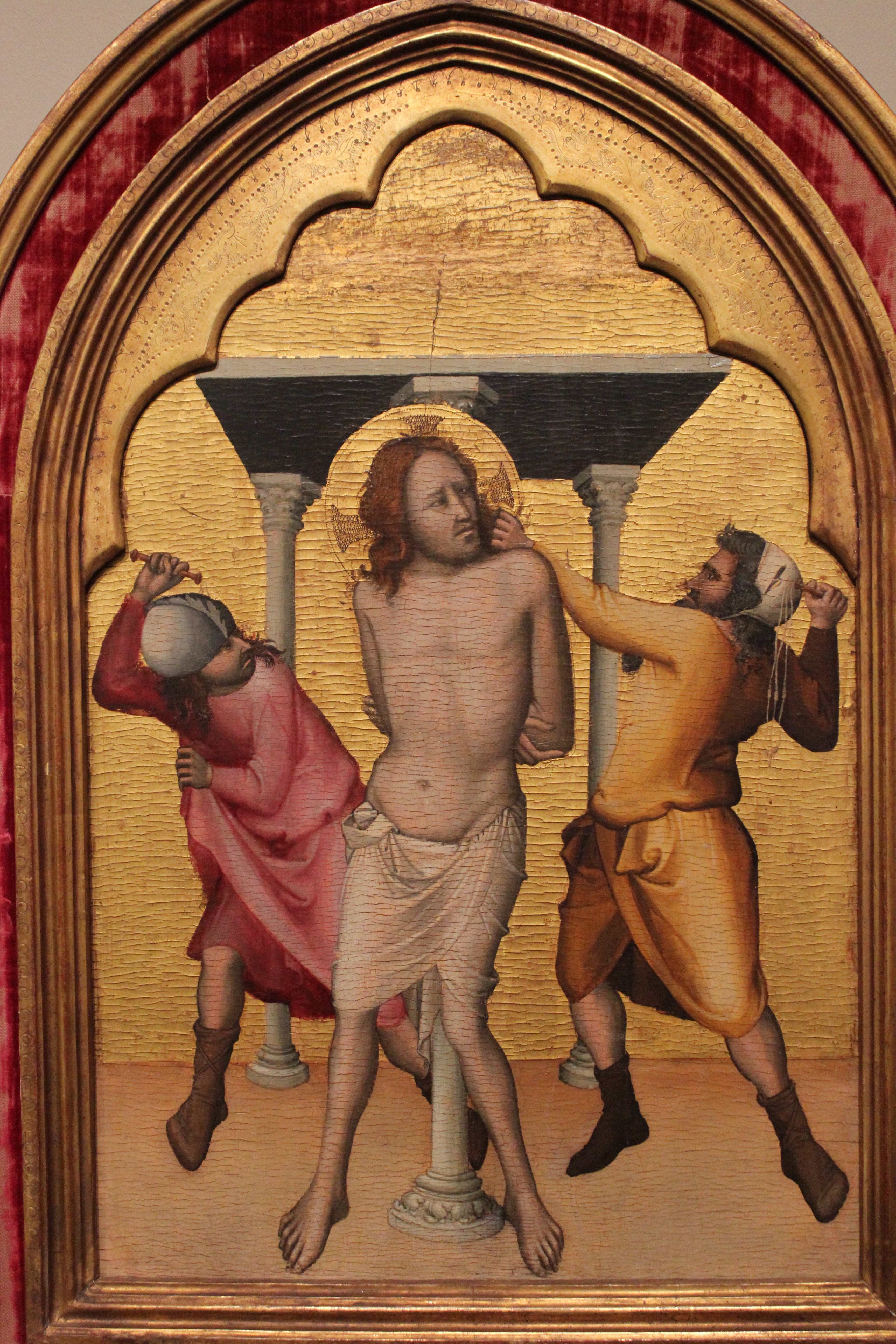 Seattle Art Museum. Flagelación de Cristo por Dalmasio Scannabecchi.